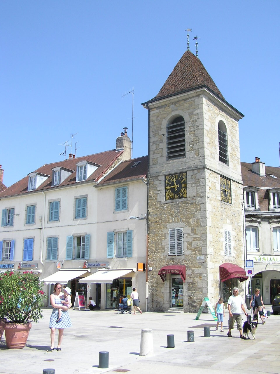 Tour de l'horloge à Lons-le-Saunier. Elle borde la place qui se situe sur les anciennes douves de la ville.